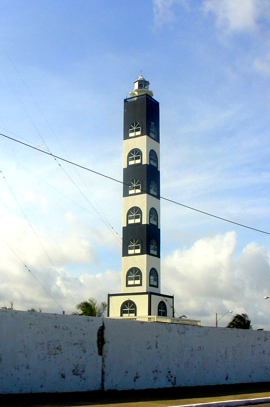 Farol do Bairro Coroa do Meio em Aracaju.